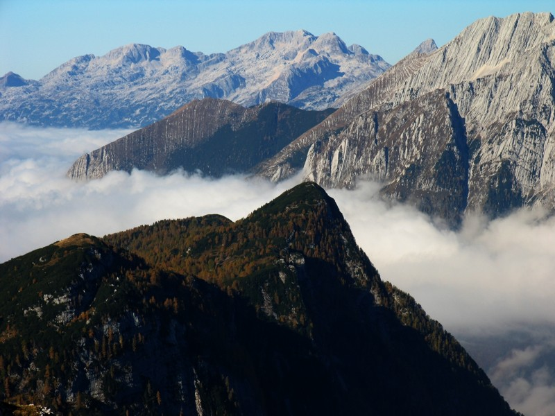 Triglavski Narodni Park